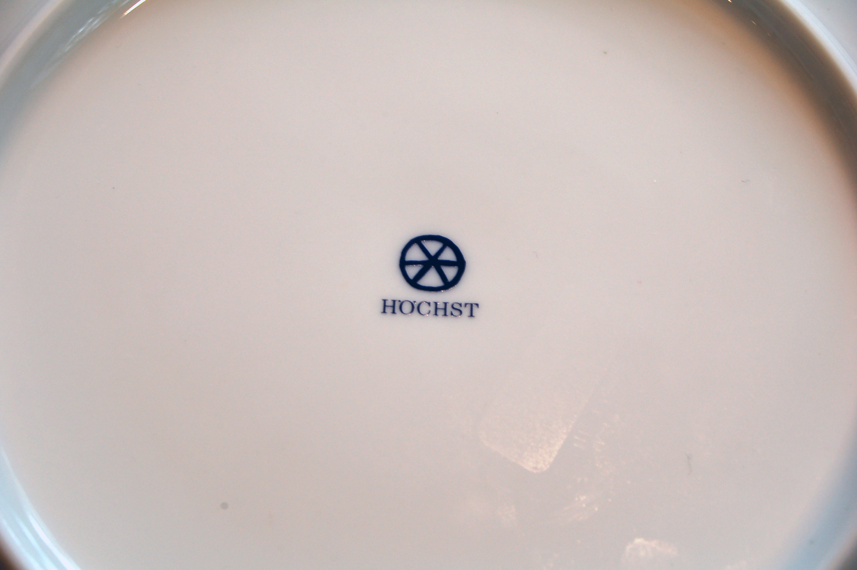 Das Mainzer Rad ist seit 1746 Firmenzeichen der Porzellanmanufaktur Höchst